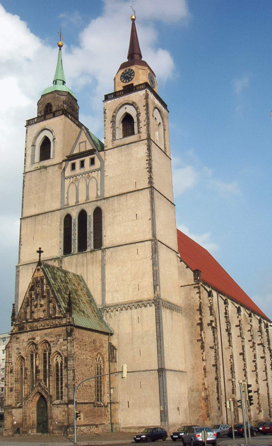 Johanniskirche in Magdeburg, selbst aufgenommen am 23.3.2005, erteilte Lizenz: GNU-FDL